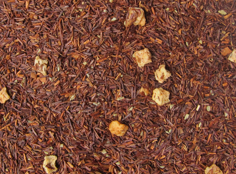 El Rooibos es una infusión sin cafeína que se acostumbra aromatizar y utilizar para preparar un té helado